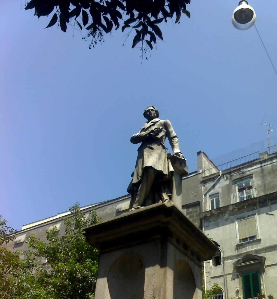 Statua di Vincenzo Bellini in Piazza Bellini a Napoli.